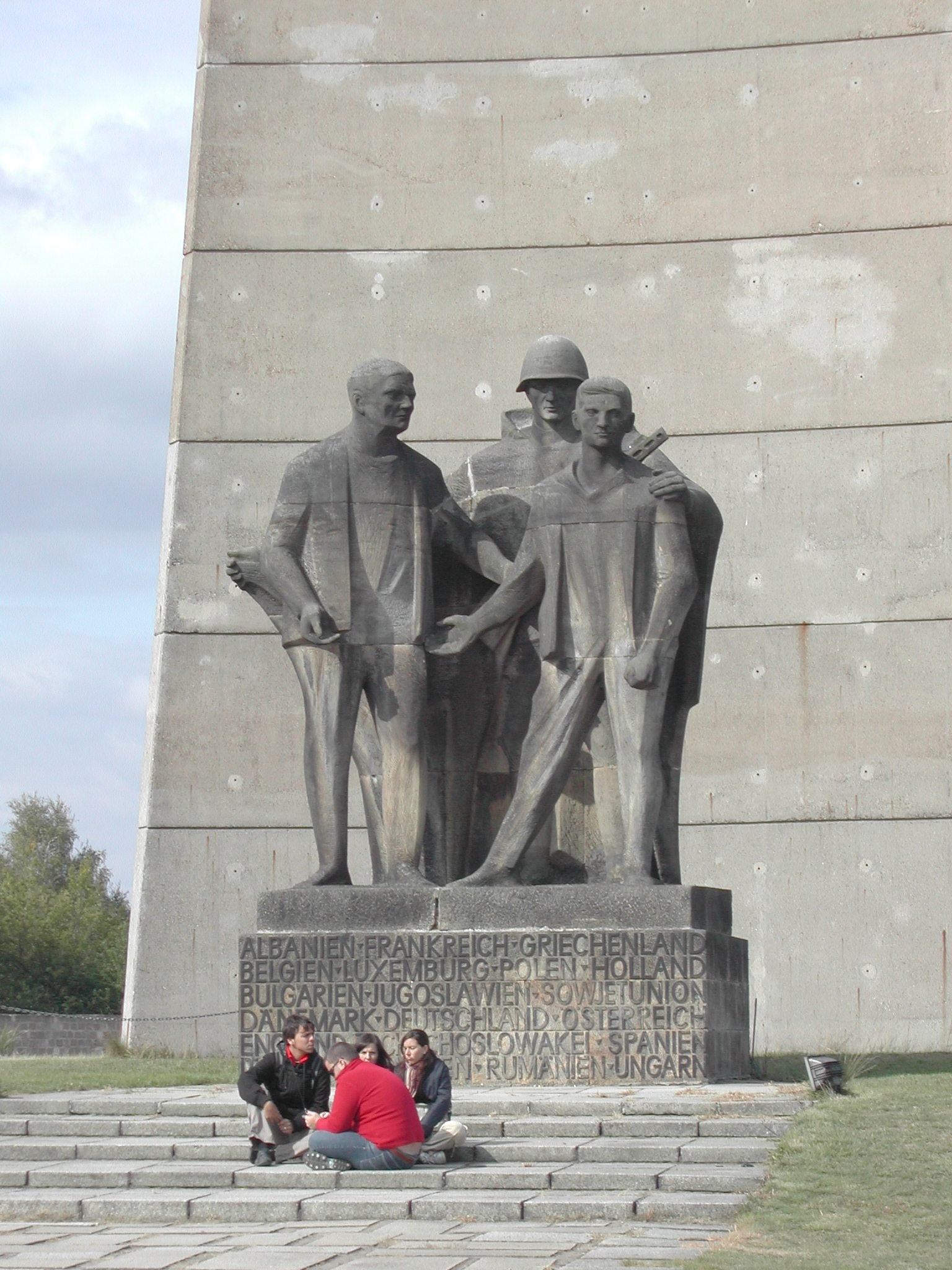 Sachsenhausen: Particolare del Monumento